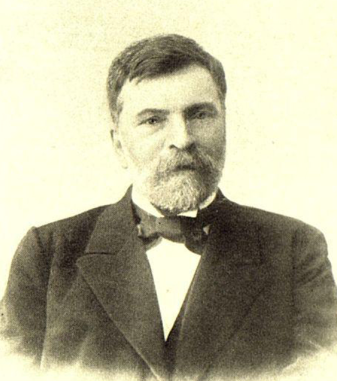 Ковалевский Владимир Иванович, председатель правления (1908—1909) Санкт-Петербургского частного коммерческого банка